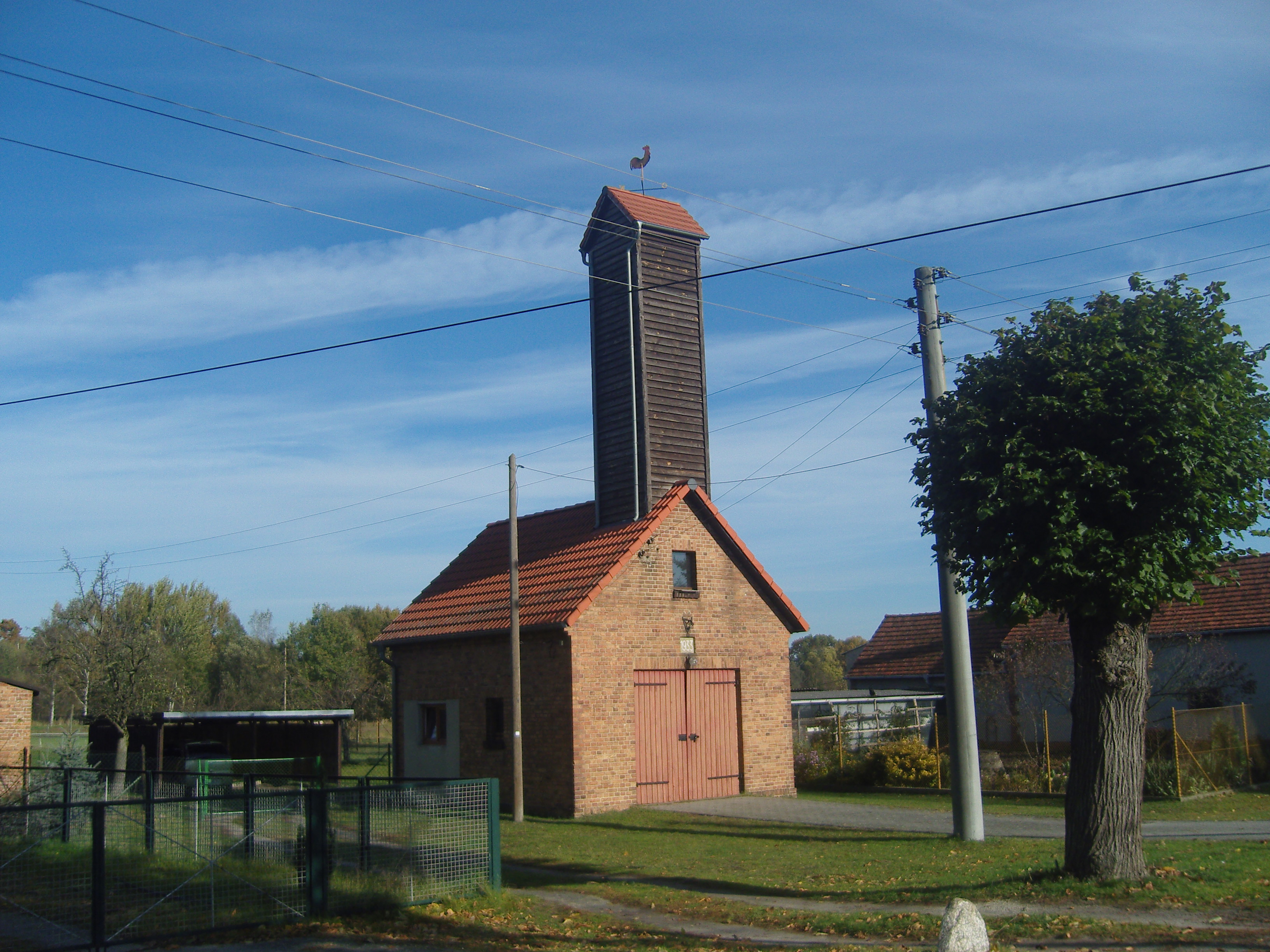 Feuerwehrgerätehaus in Muckwar, Gemeinde Luckaitztal